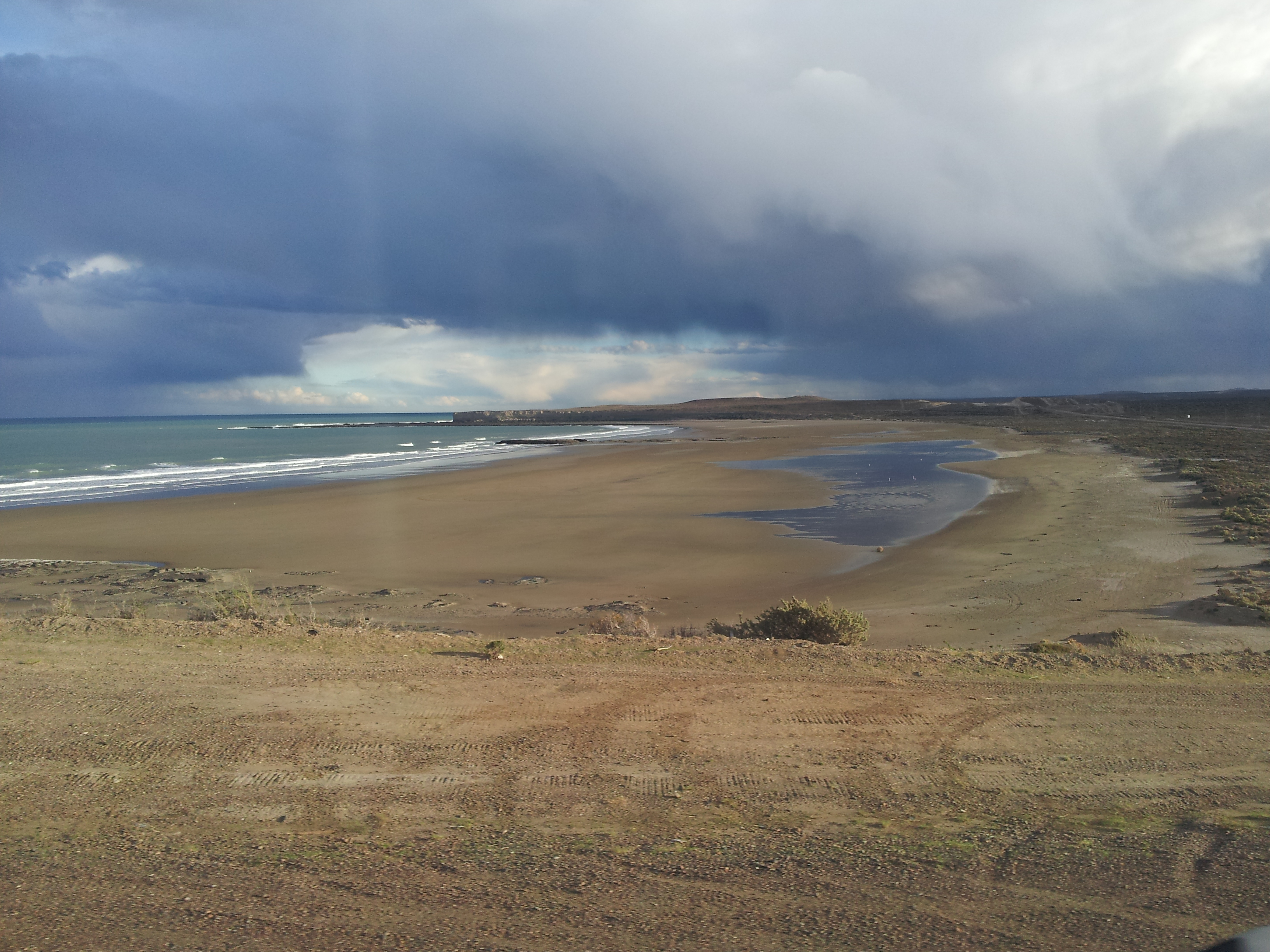 Vista de la bahía del Fondo